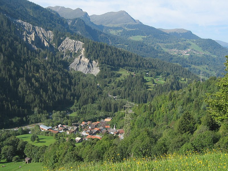 Molinis (CH-GR)